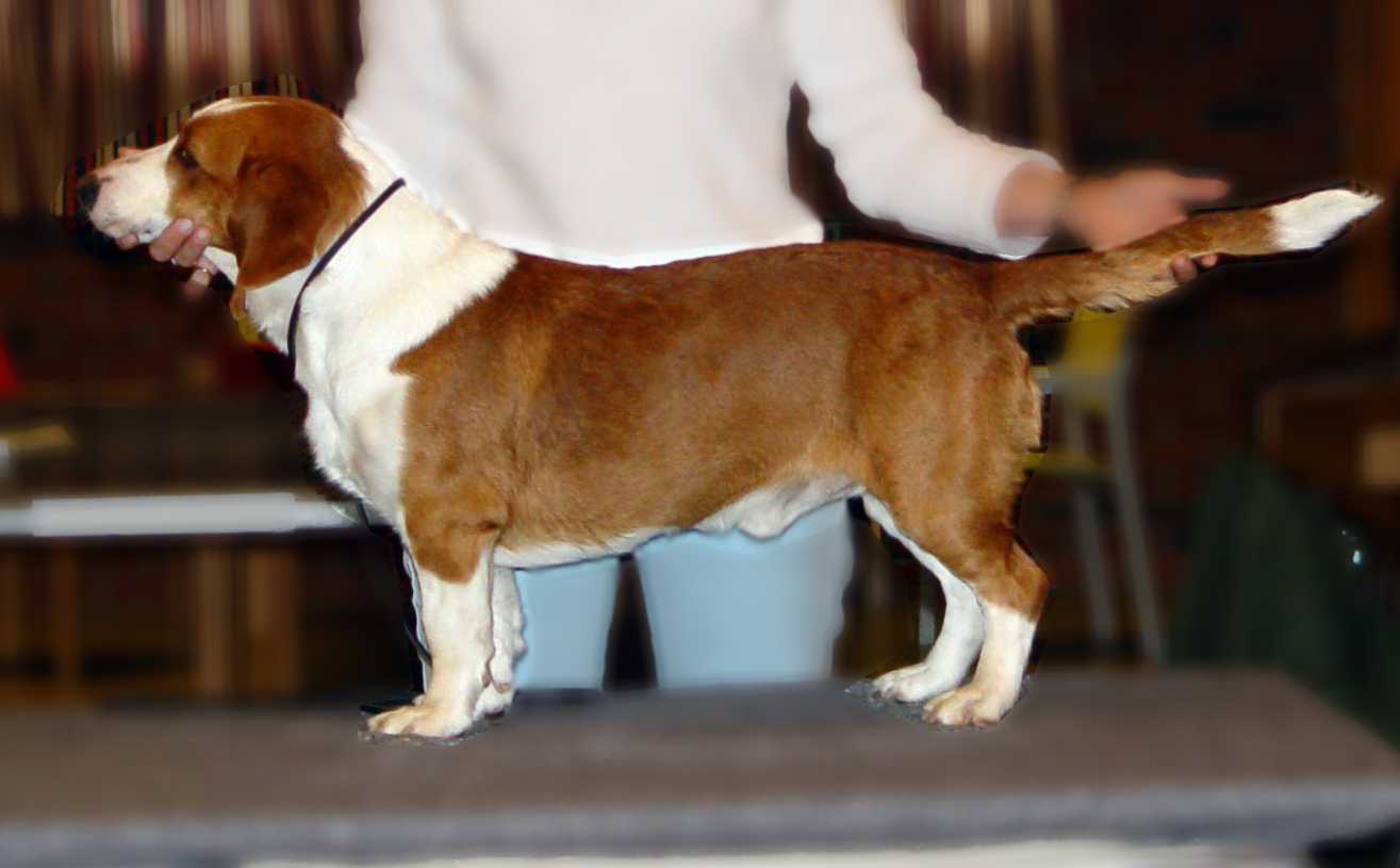 Drever (FCI #130), «NUCH Härkilas Tanjo» (†)